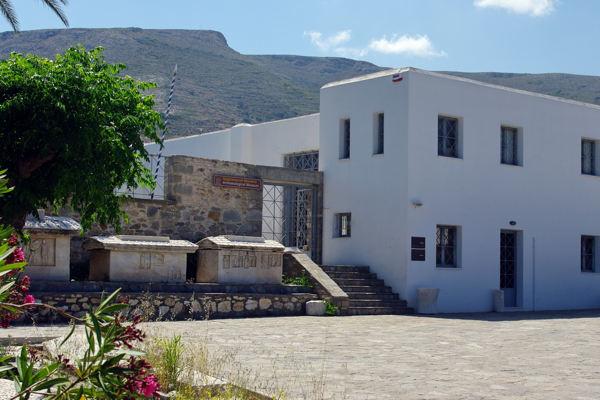 Archäolog. Museum in Parikia mit antiken Gräbern